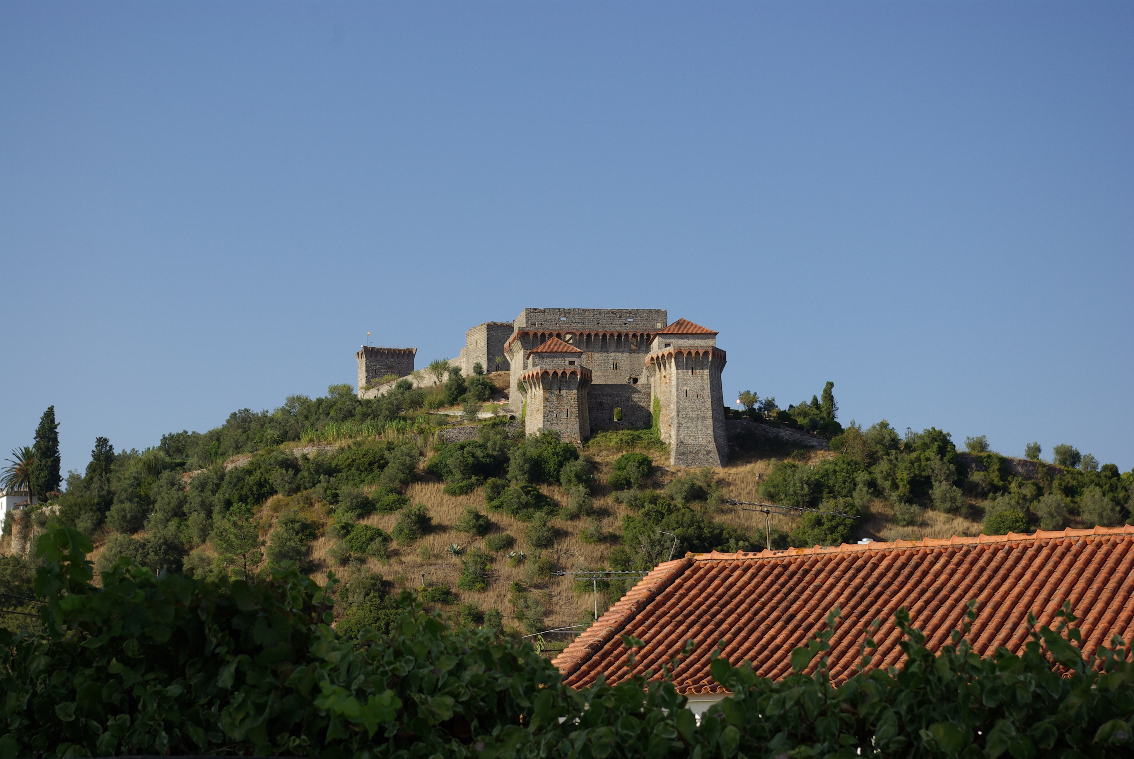 La forteresse d'Ourém au Portugal